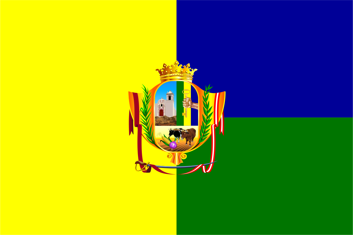 Distrito de Sachaca - Provincia de Arequipa - Región Arequipa